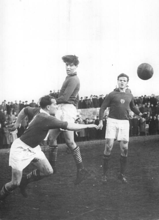 Zentralbild / Fu-Bey Bey-ot / 27.1.1957 / Toto-Fußballspiel Motor Berlin gegen Chemie Grünau-Schmöckwitz Am Sonntag, dem 27.1.1957, standen sich in der Wuhlheide in einem Fußball-Totospiel die Mannschaften von Motor Berlin und Chemie Grünau-Schmöckwitz gegenüber. UBz.: Eine Szene aus dem Spiel. Wir erkennen links den Chemie-Verteidiger Schiller und Kunz (Motor).